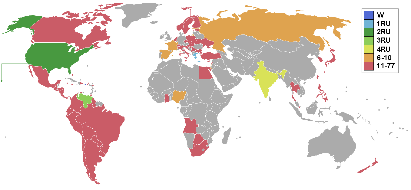 Страны участвовавшие в конкурсе Мисс Вселенная 2001